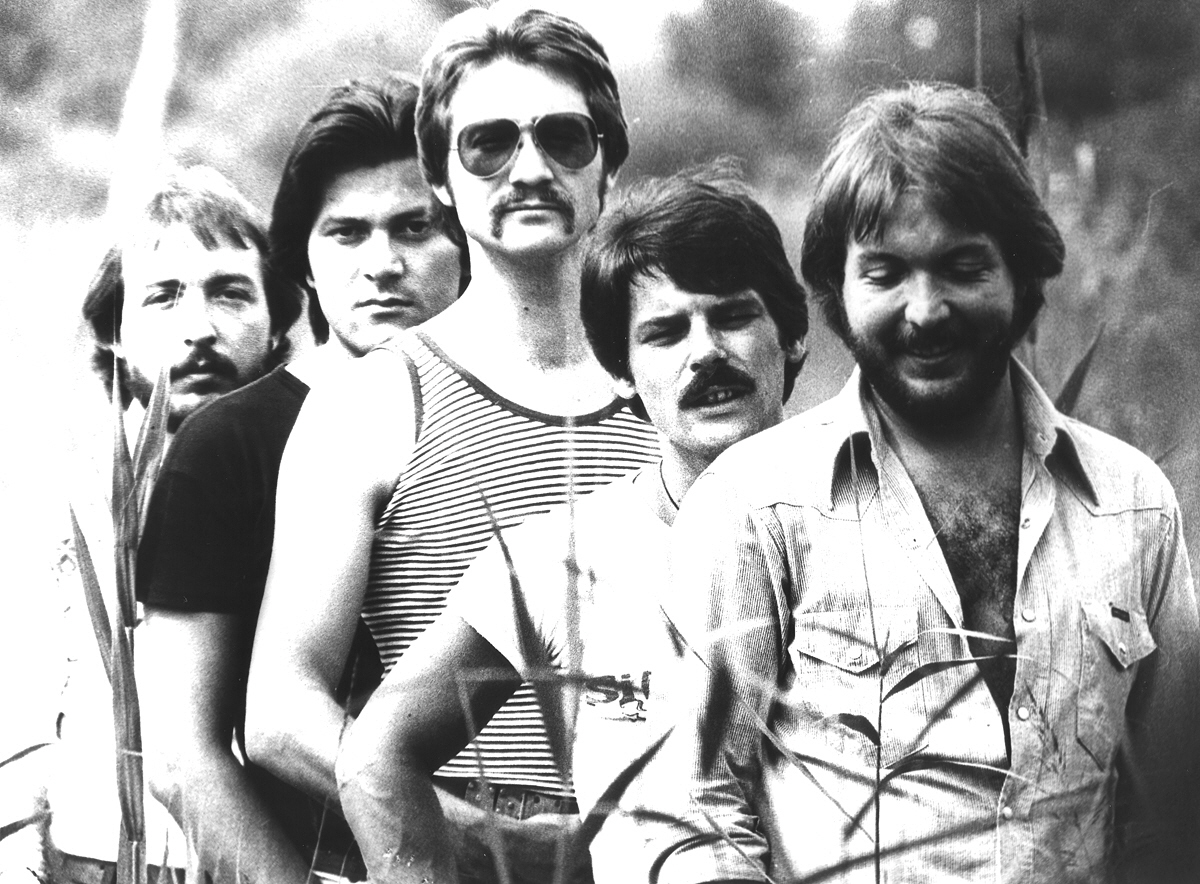 Shivananda - Schweizer Jazzrock-Band (schwarz-weiß)